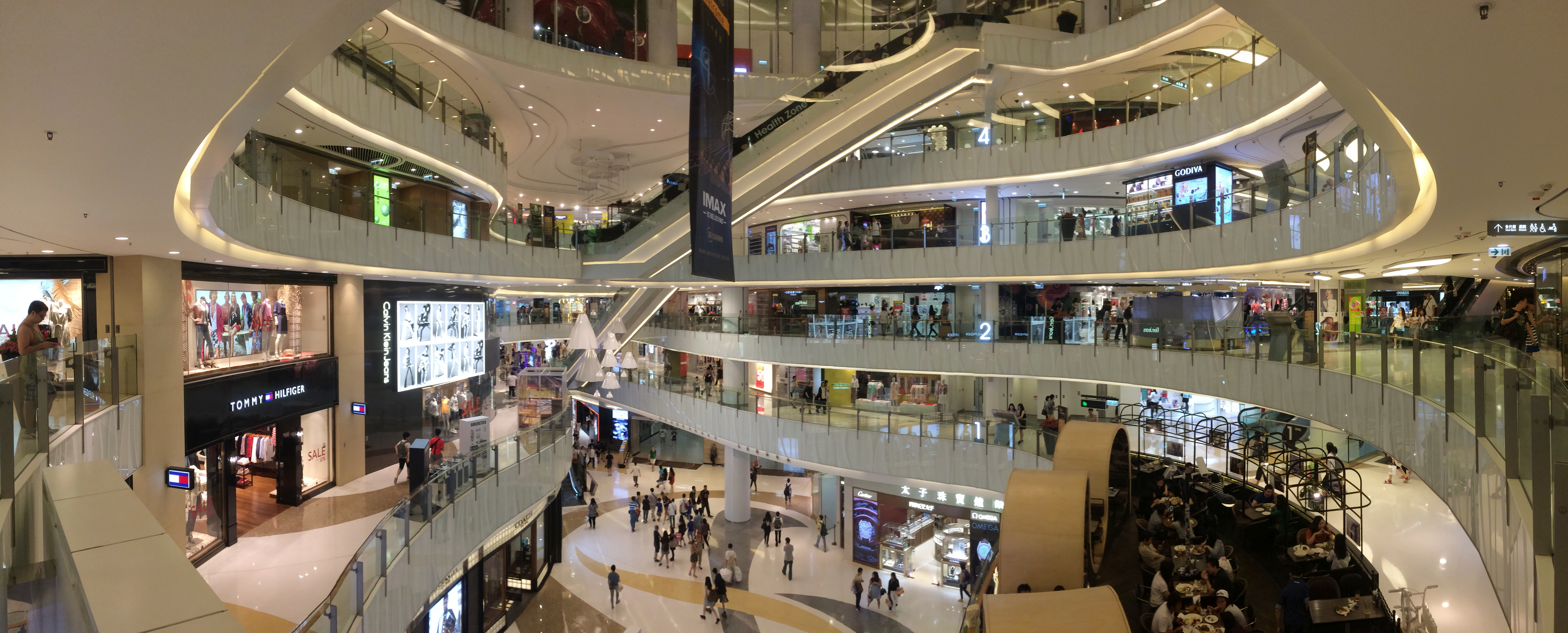 MOKO Mall Void Pano